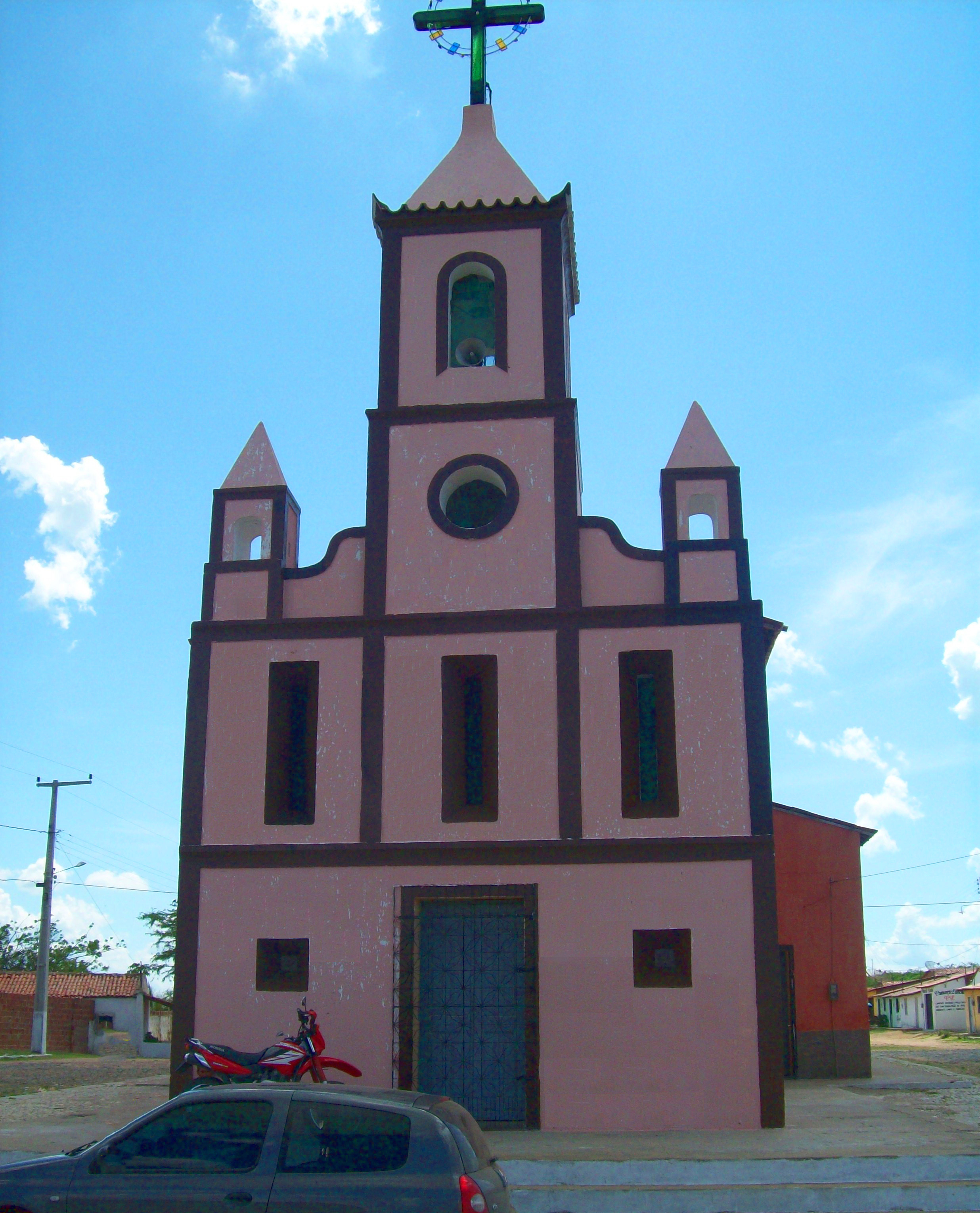 Itapiúna CE Brasil - Capela de São Felix, distrito de Palmatória